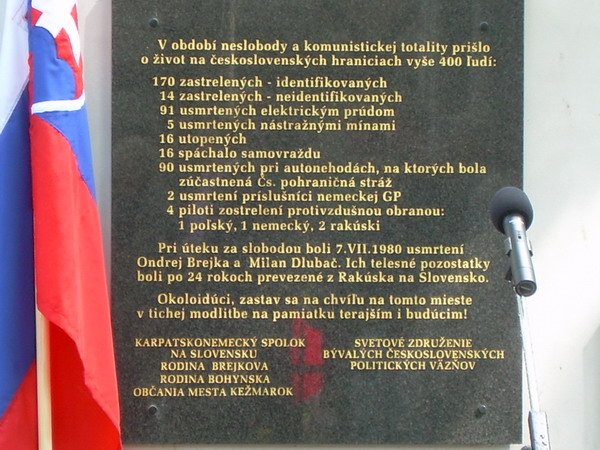 Pamätník usmrtených na hraniciach v r. 1948-1989 v Kežmarku-text